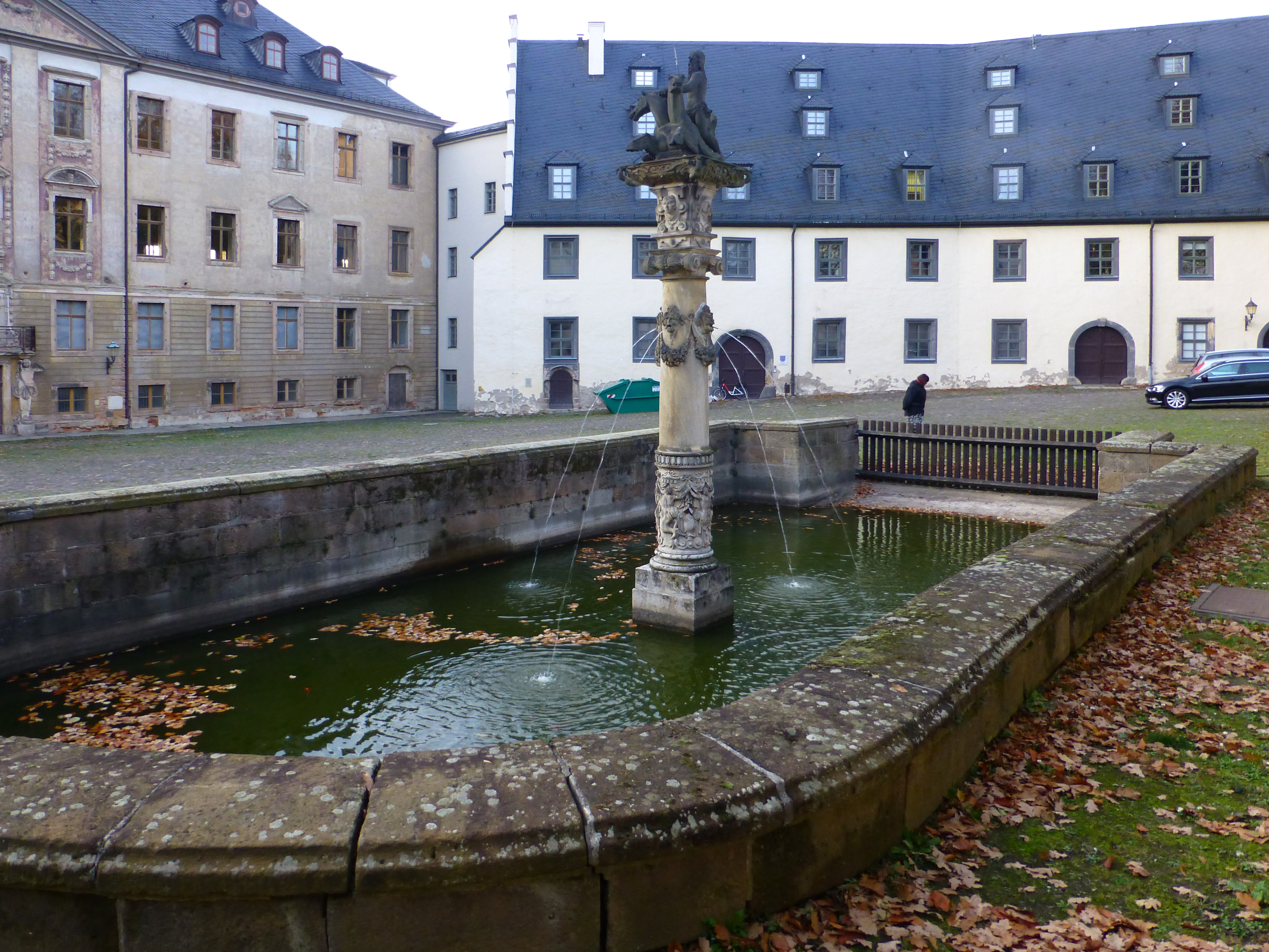 Pferdeschwemme im Schloss Altenburg 1